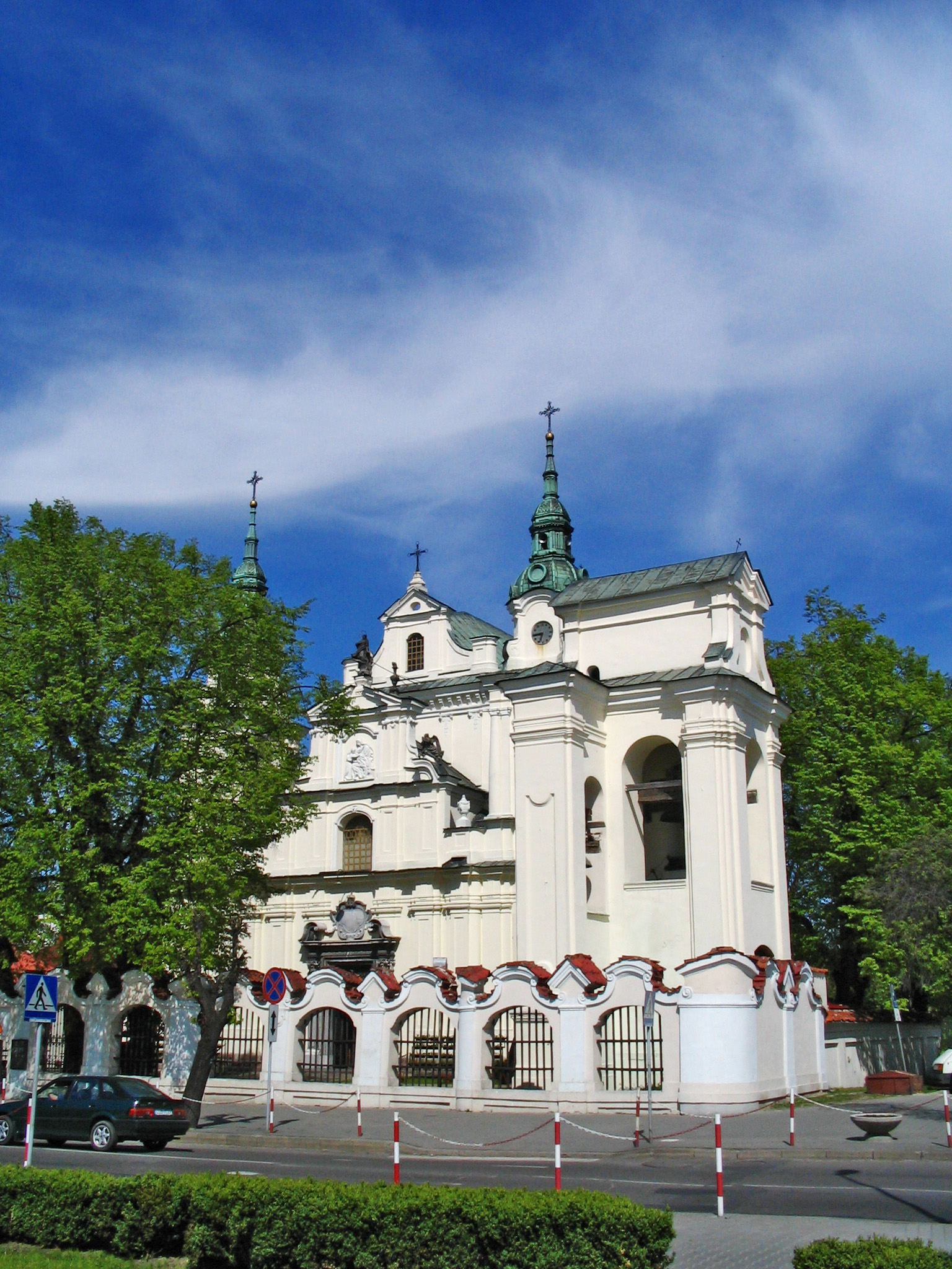 Bazylika pw. św. Anny – budowana w latach 1733-1738, projektu Pawła Antoniego Fontany. Barokowa, murowana, dwu-wieżowa, ufundowana przez Pawła Sanguszkę.